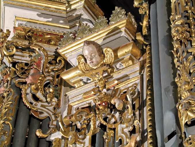 Gröninger Orgel der Martinikirche in Halberstadt, Sachsen-Anhalt, Deutschland